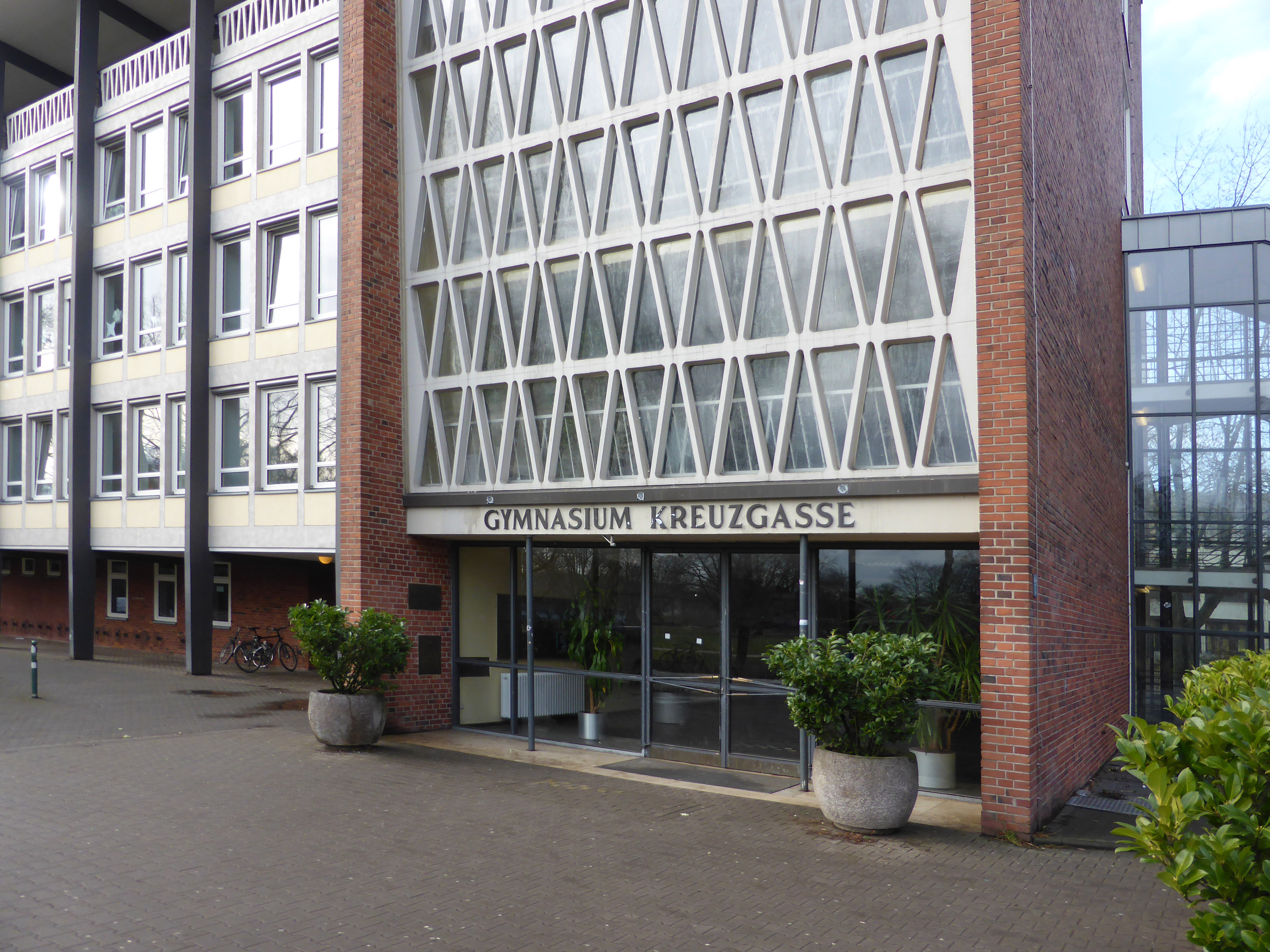 Gymnasium Kreuzgasse, Köln, Vogelsanger Straße 1. This is a photograph of an architectural monument.